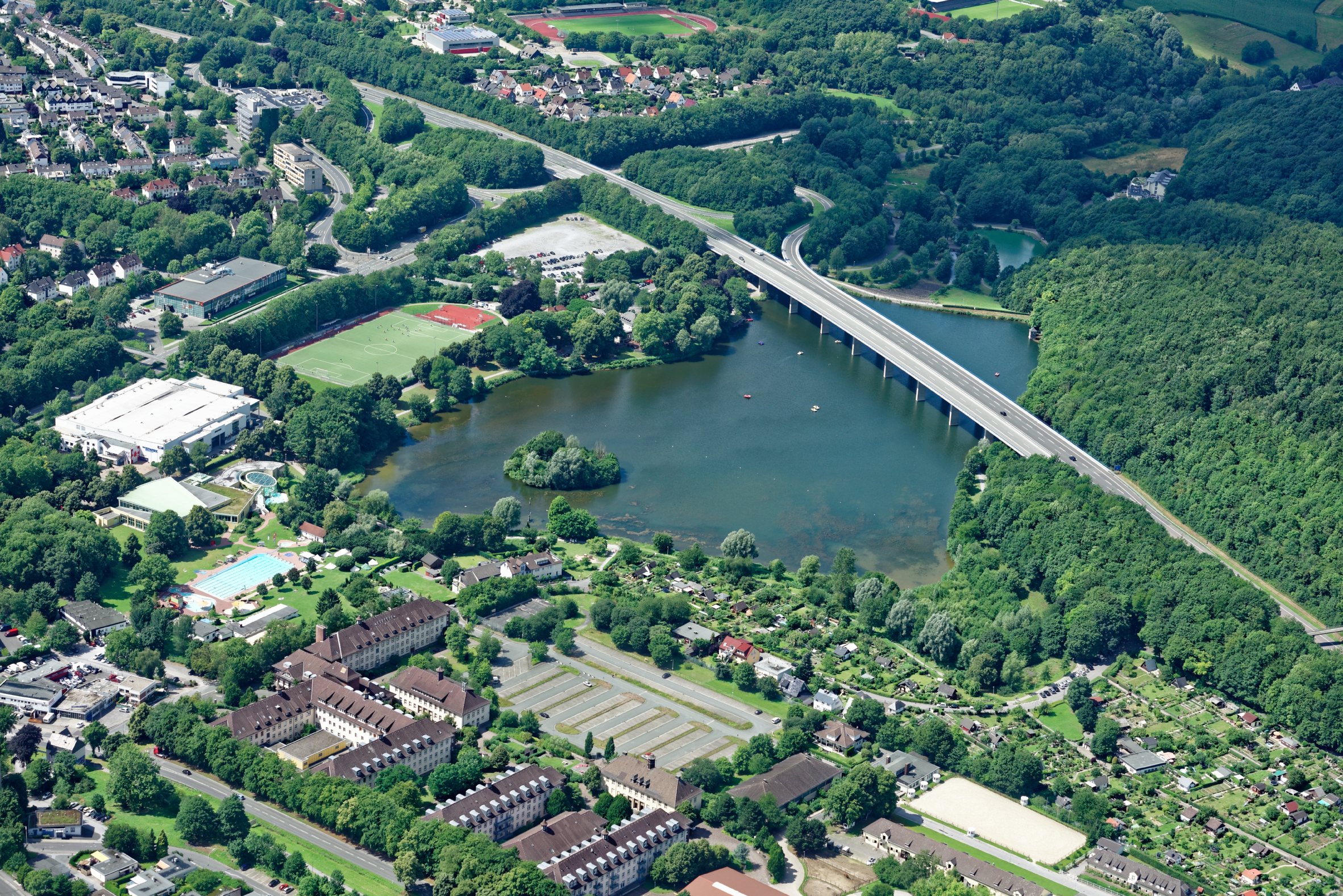 Fotoflug Sauerland West. Luftaufnahme: Seilersee mit Bundesautobahn 46, links am See die Eissporthalle und unten der Campus Iserlohn der Business and Information Technology School, Iserlohn.